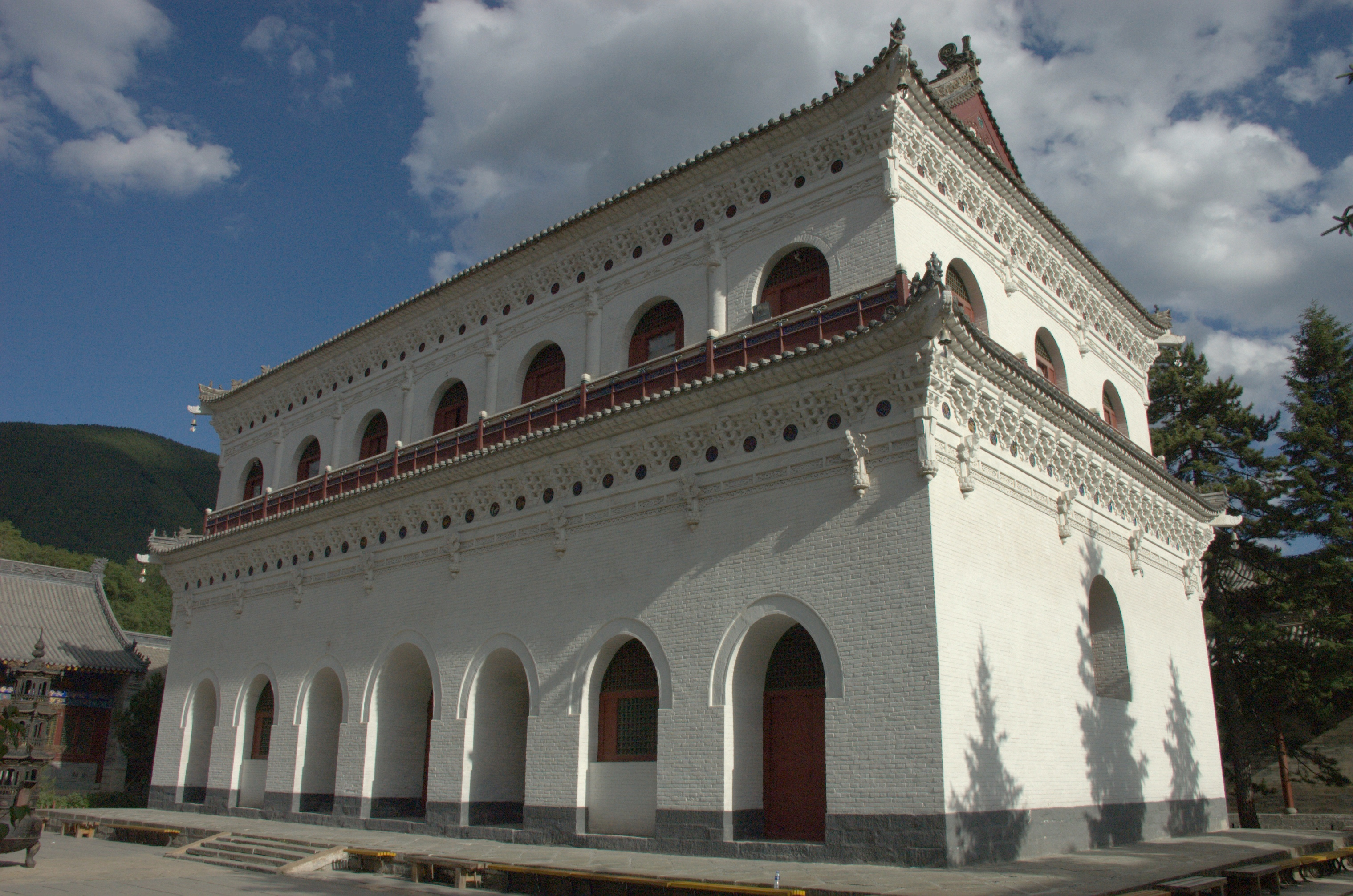 山西五台山显通寺无量殿（无梁殿）